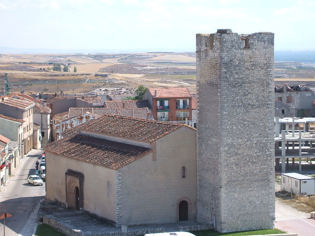 Cuéllar: Iglesia mudéjar de San Martín vista desde la torre del homenaje del Castillo de Cuéllar.